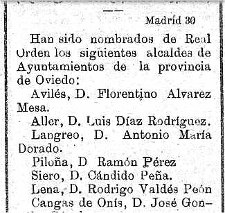 Florentino Alvarez Mesa es nombrado alcalde de Aviles